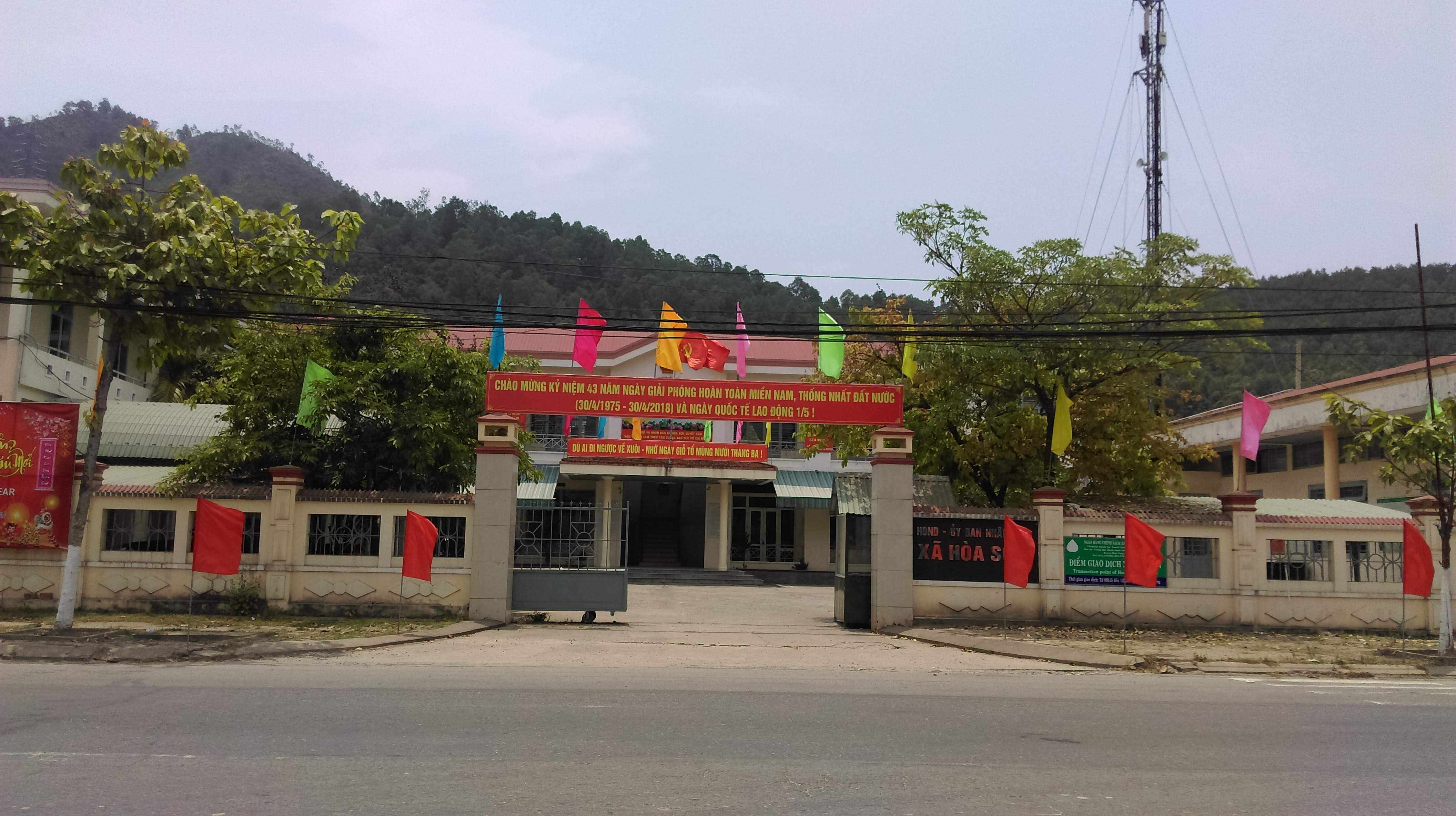 UBND xã Hòa Sơn, Hòa Vang, Đà Nẵng